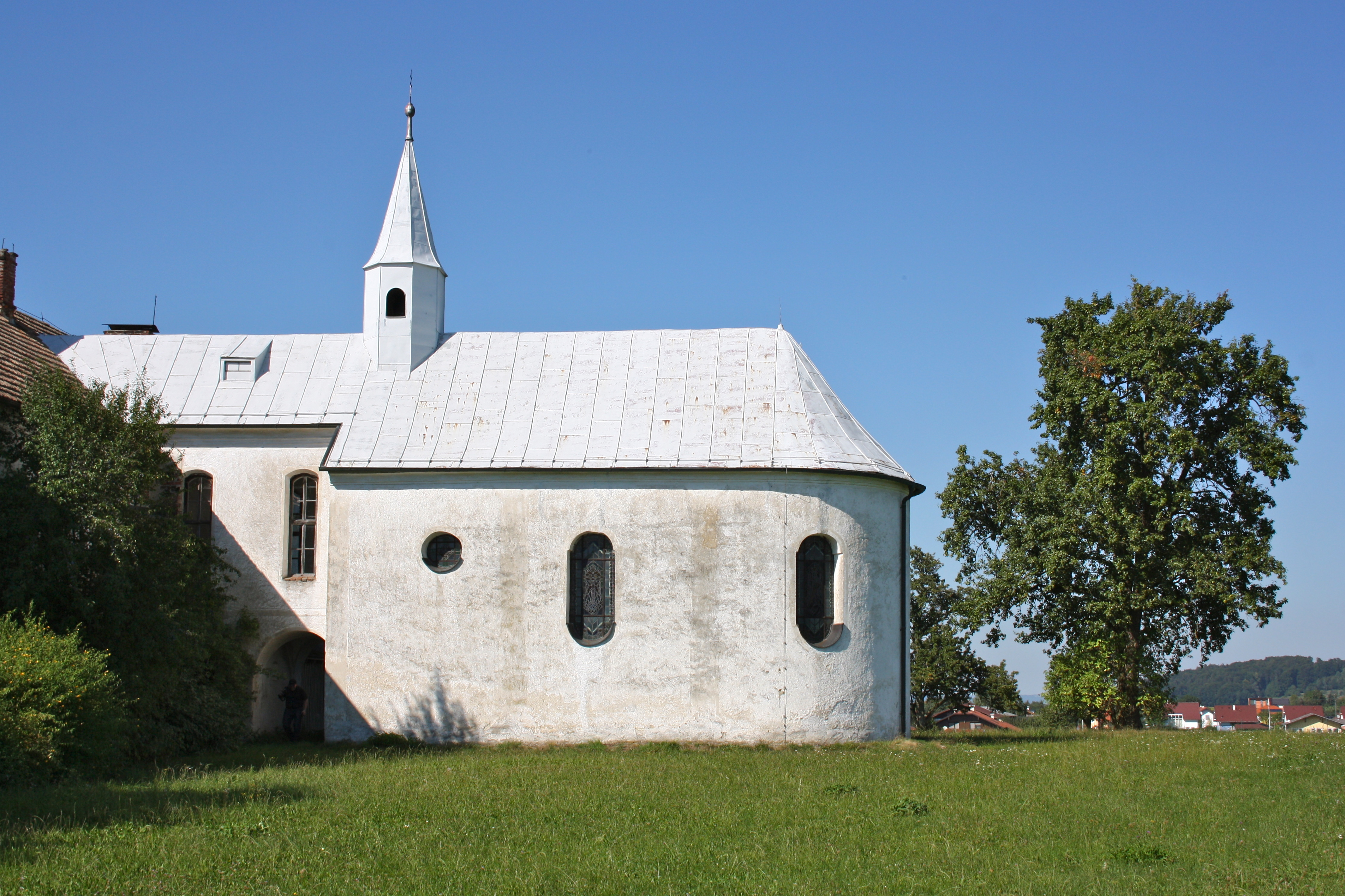 Schutzengelkapelle